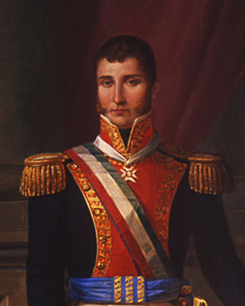 Agustin de Iturbide, de Primitivo Miranda, 1860, recortado.